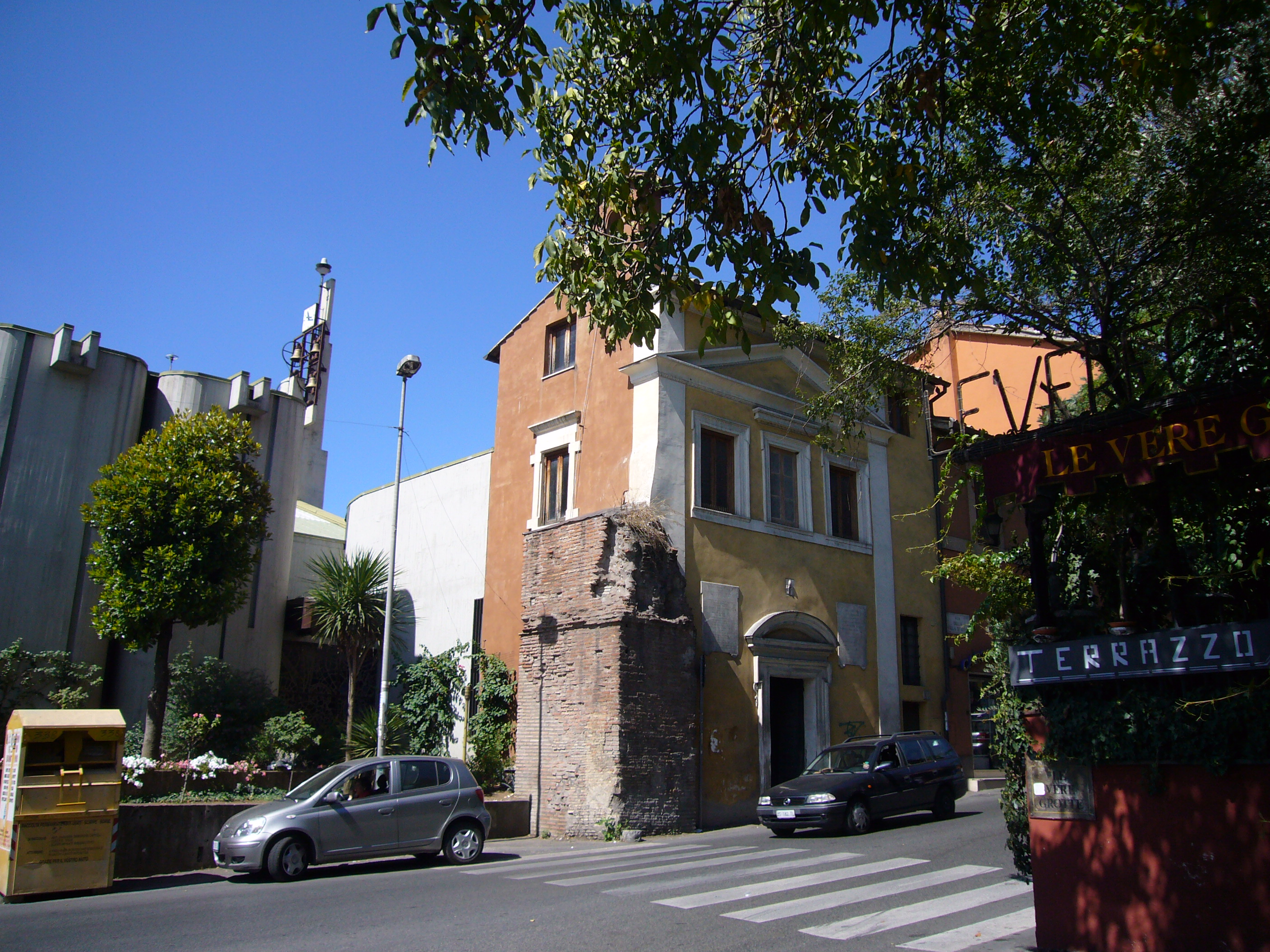 Roma, santi Urbano e Lorenzo a Prima Porta